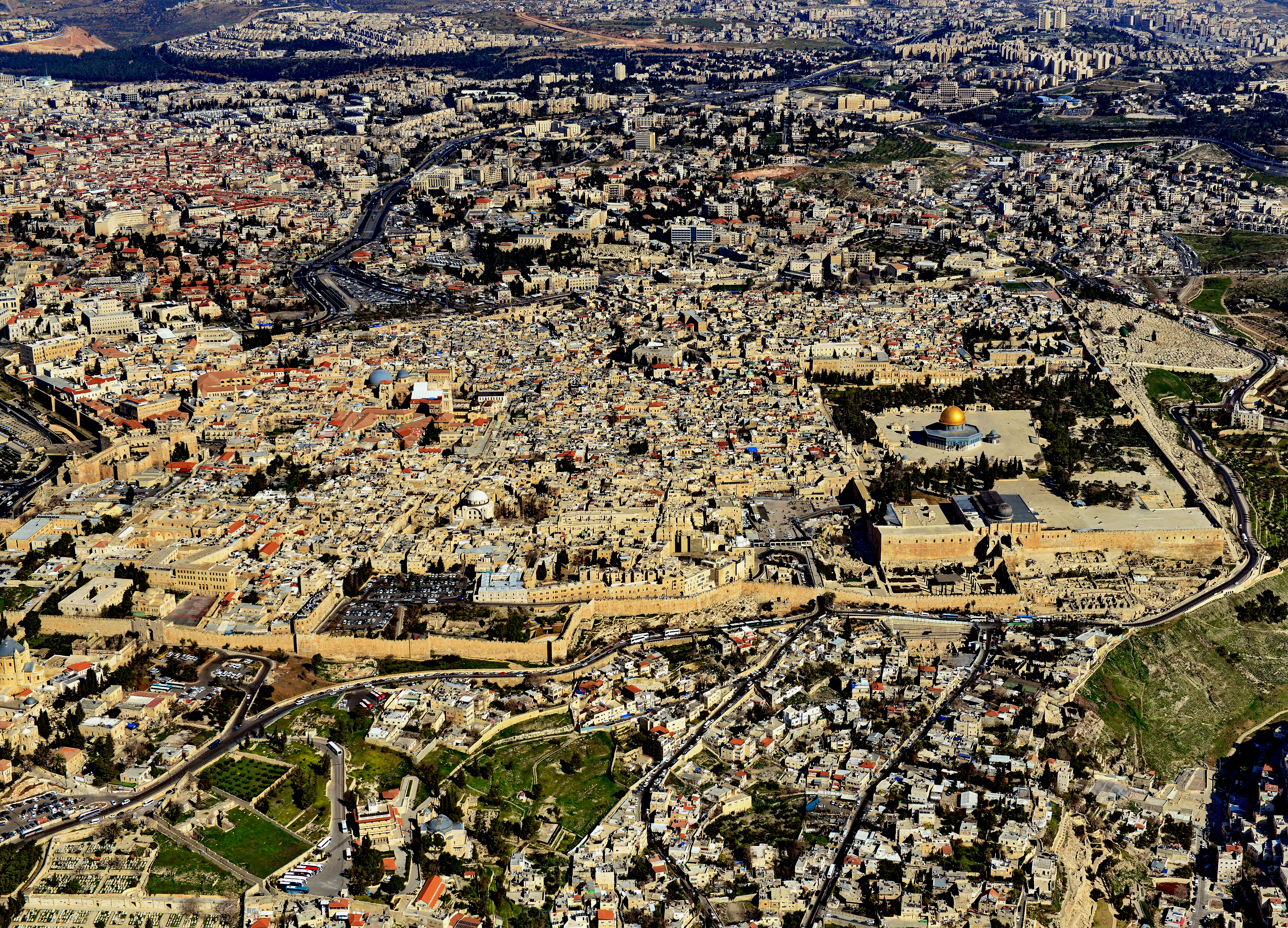 העיר העתיקה בירושלים (בערבית: بلدة القدس القديمة, נהגה: בִּלִדַת אֶלקוּדְס אֶלקָדִימָה) היא האזור העירוני העתיק של ירושלים. שטחה המוקף על ידי חומות ירושלים הוא כ-850 דונם.כמו כן נכללים בעיר העתיקה הר ציון ועיר דוד, הנמצאים מחוץ לחומות, בסמוך ומצד דרום. העיר העתיקה מהווה מוקד משיכה מרכזי לתיירים בני דתות ואומות שונות, אשר באים מרחבי העולם לבקר את האתרים הקדושים הנמצאים בה, ובהם: הר הבית, הכותל המערבי וכנסיית הקבר.